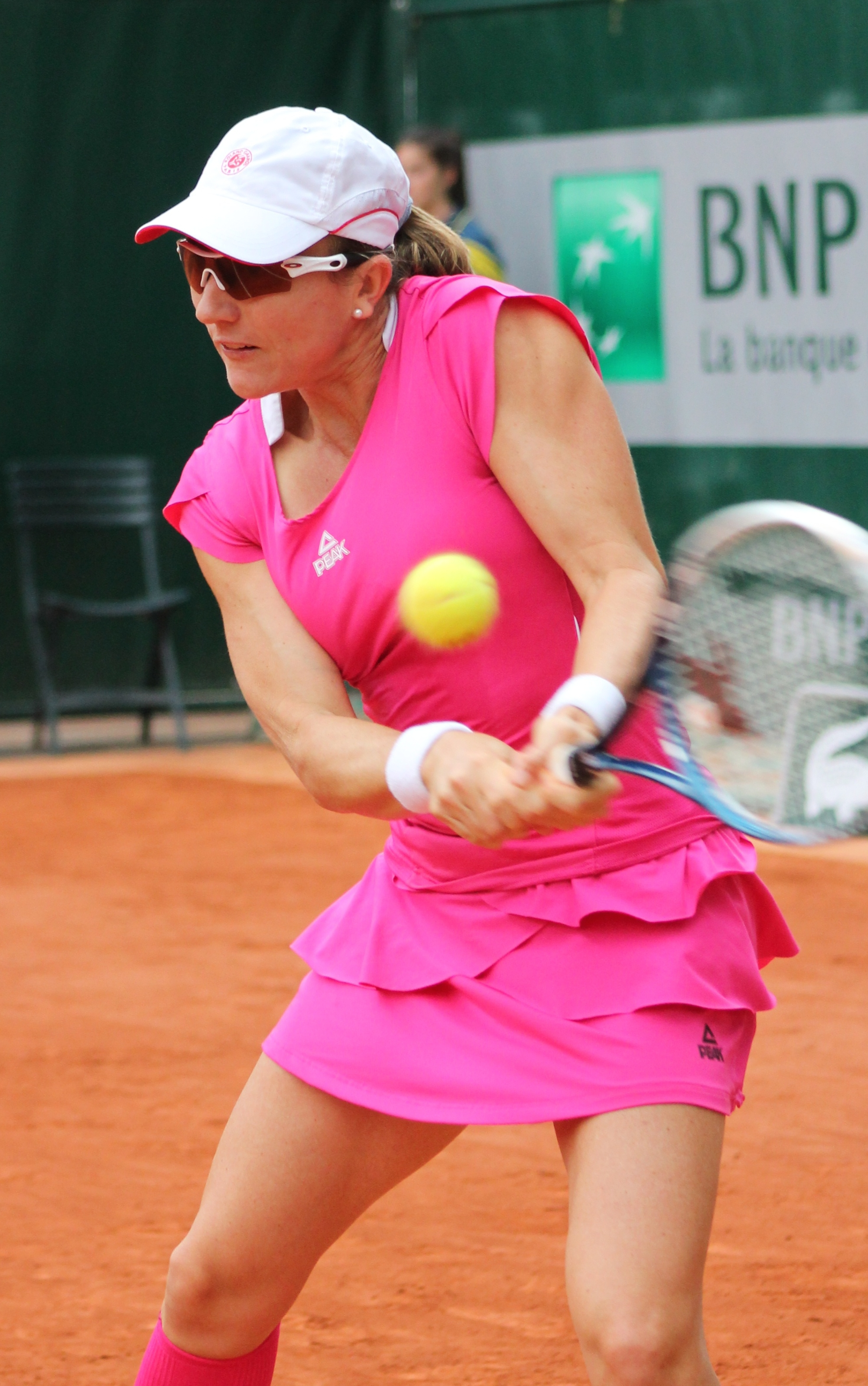 Castano RG13 (3)